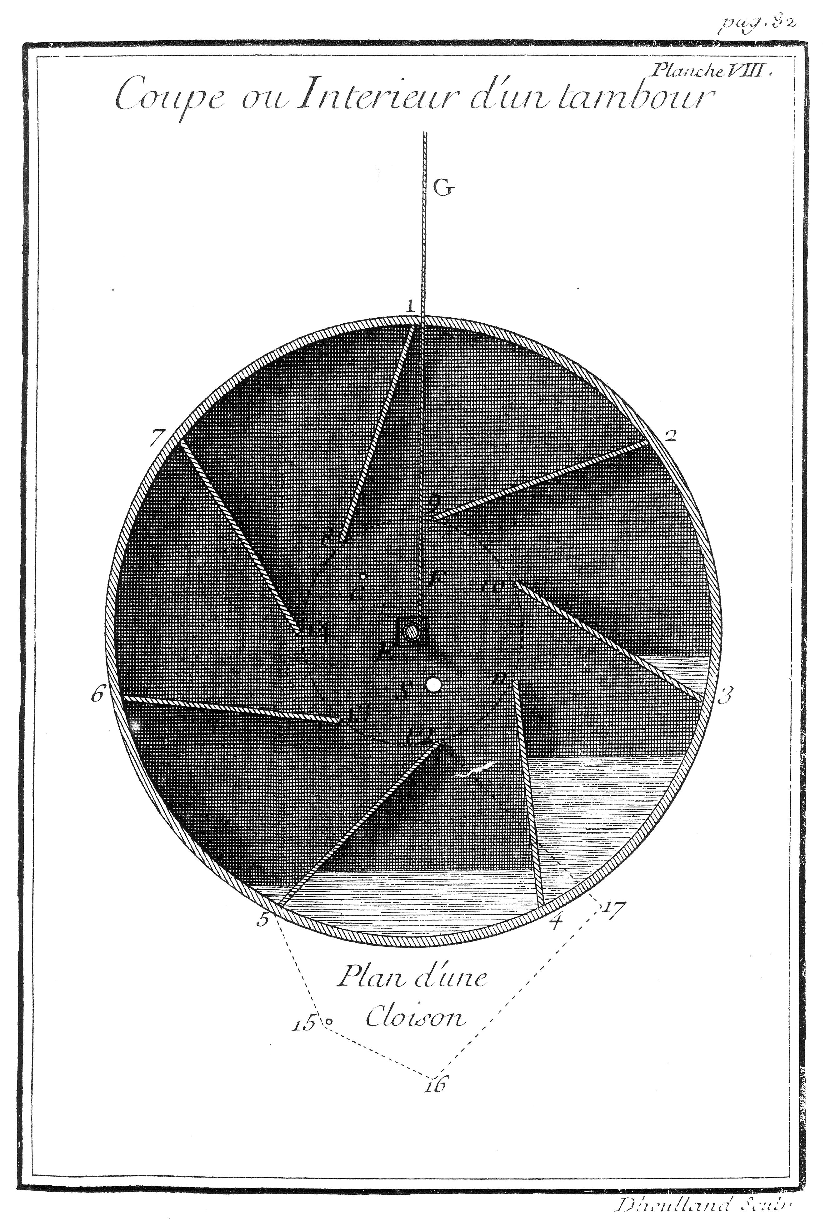 Coupe d'un tambour en éléments soudés ; remarquer le plan d'une cloison et le petit trou de passage central en 15.